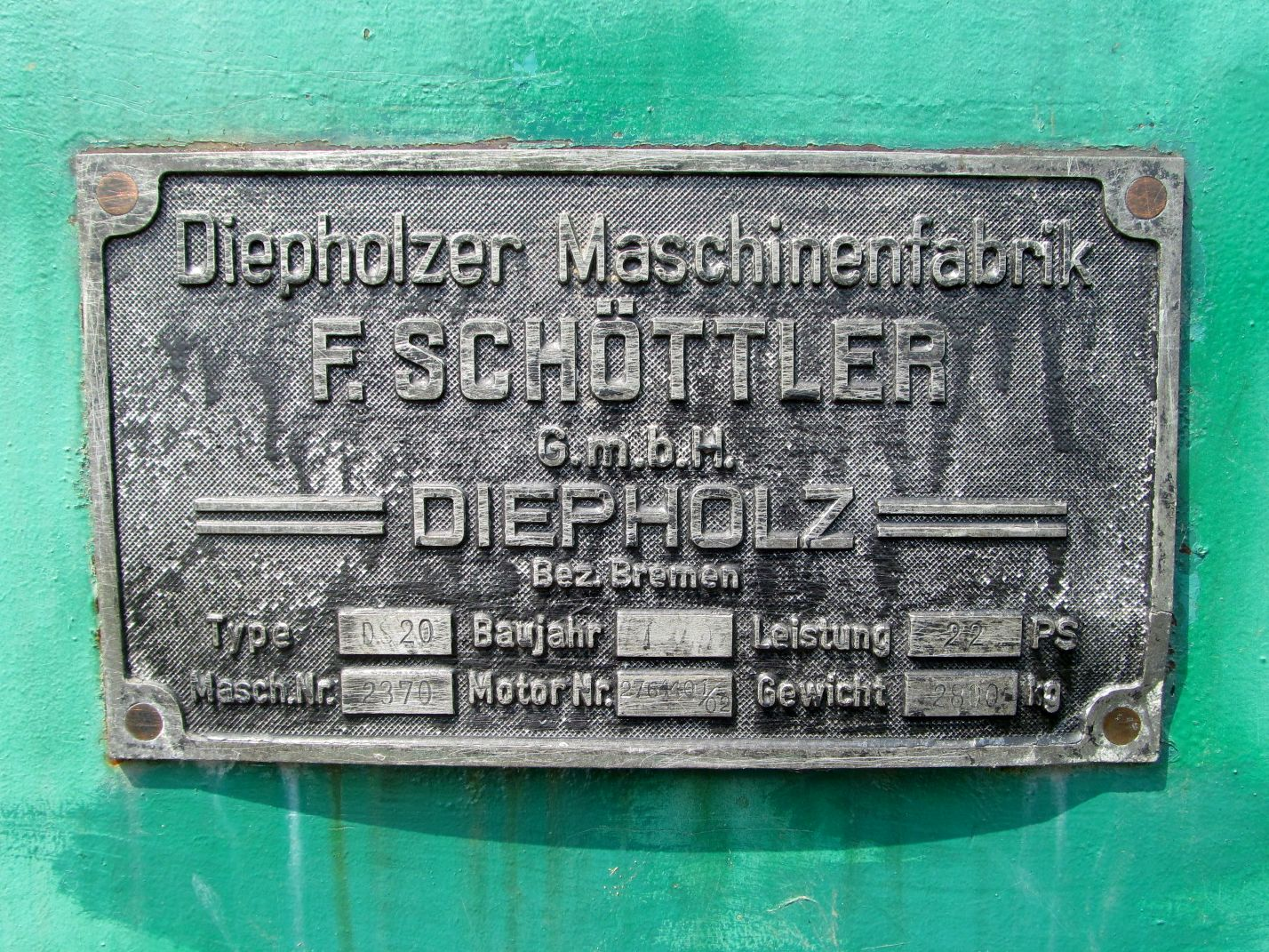 DIEMA-Herstellerschild an der ehemaligen Werksbahn der Wasserkunst Kaltehofe in Hamburg